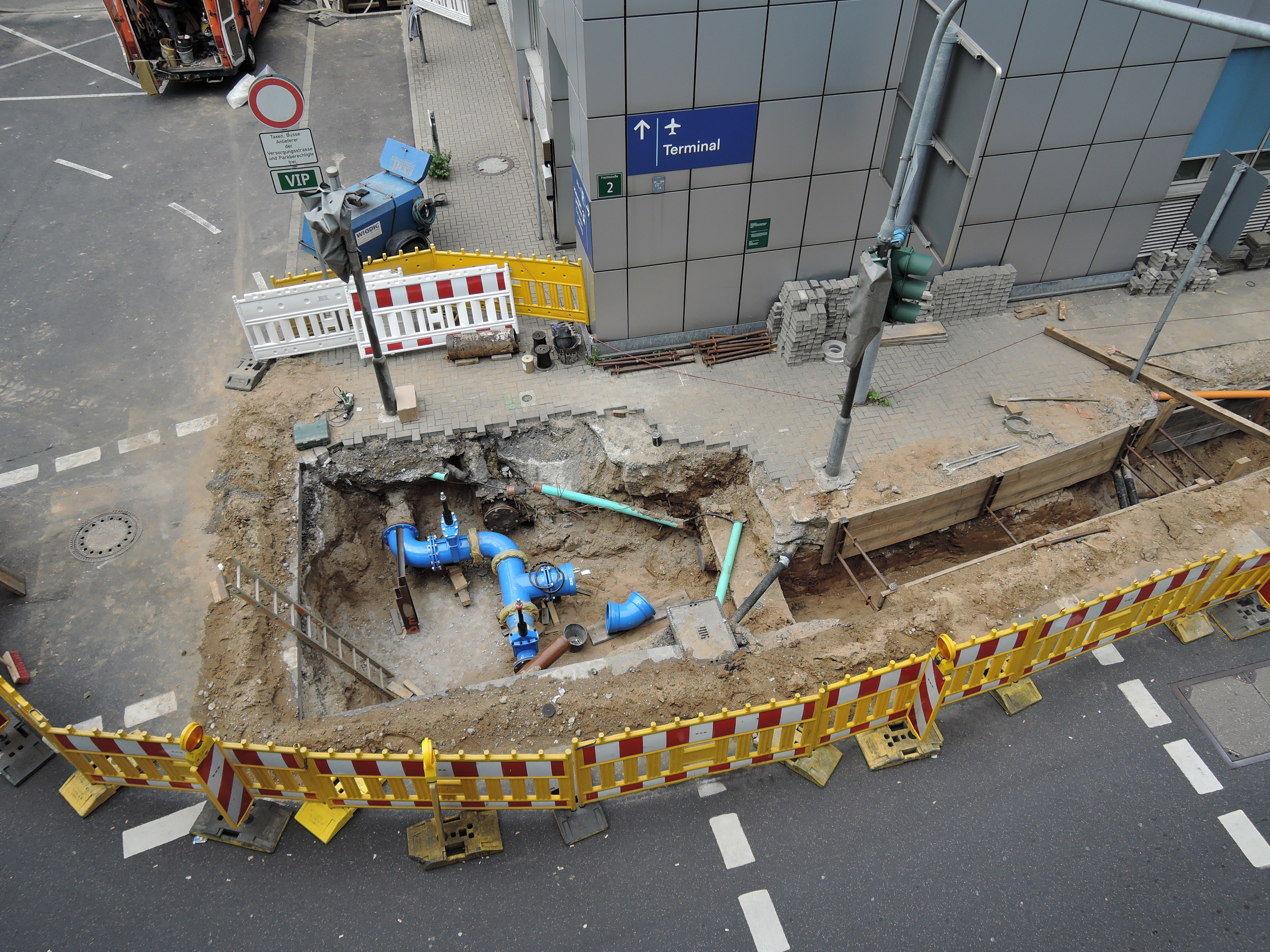 Düsseldorf Flughafen Baustelle, Frachtstraße 2/Ecke Terminalstraße. Aufgenommen vom Hochkorridor P7.